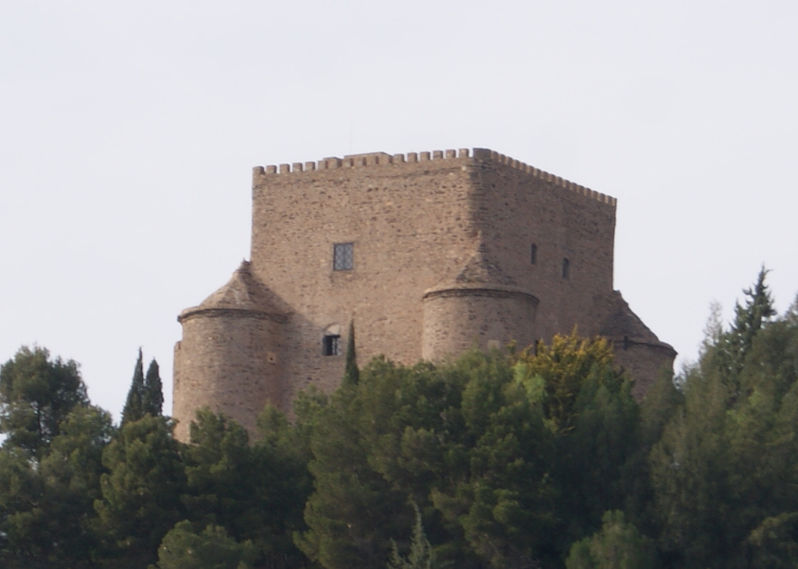 Castillo de Gérgal